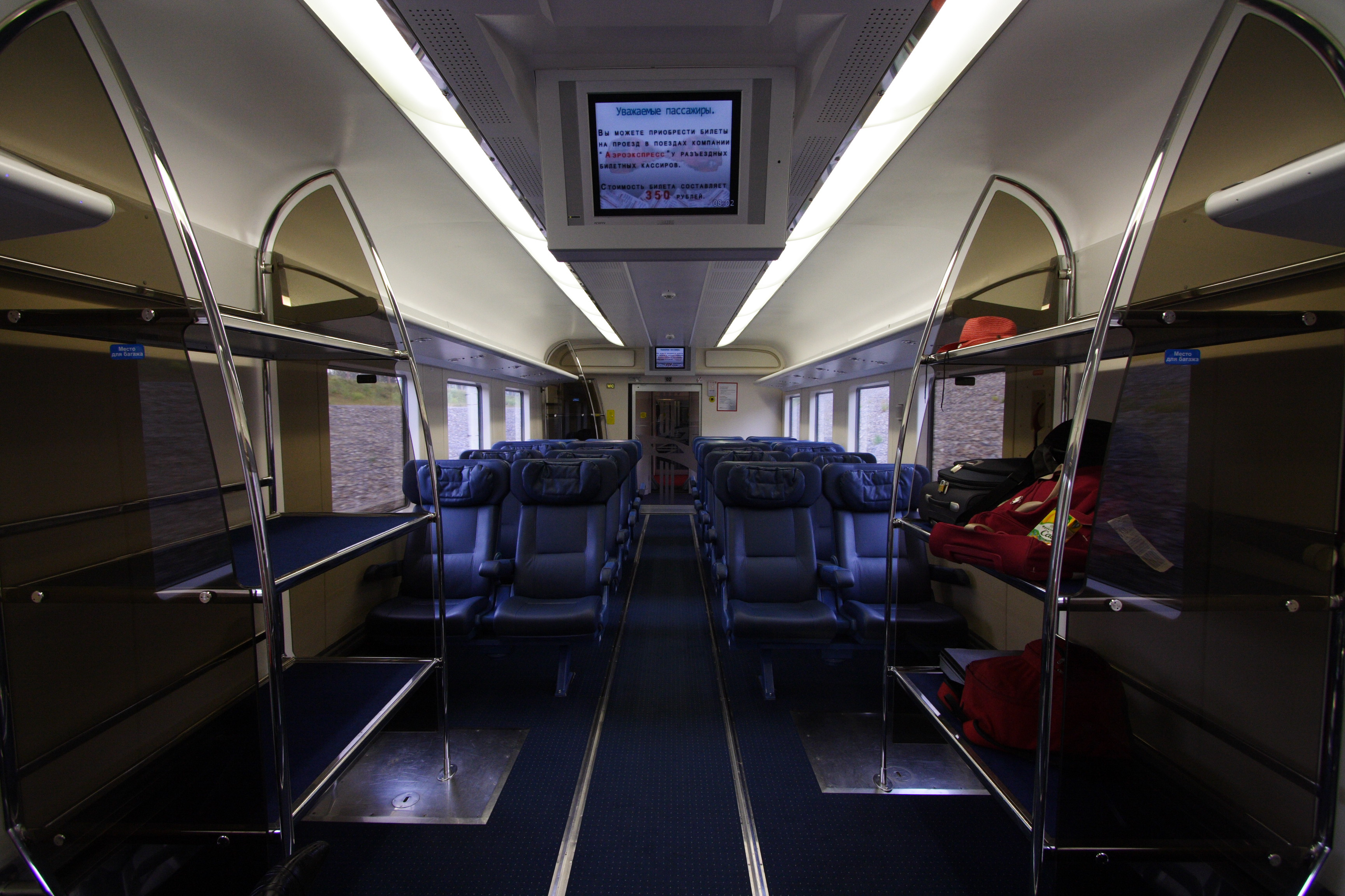 аэроэкспресс изнутри